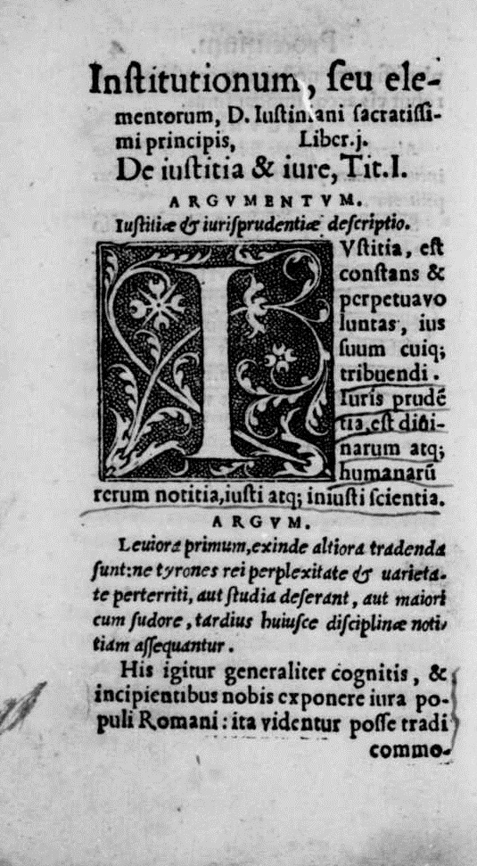 carta 4v